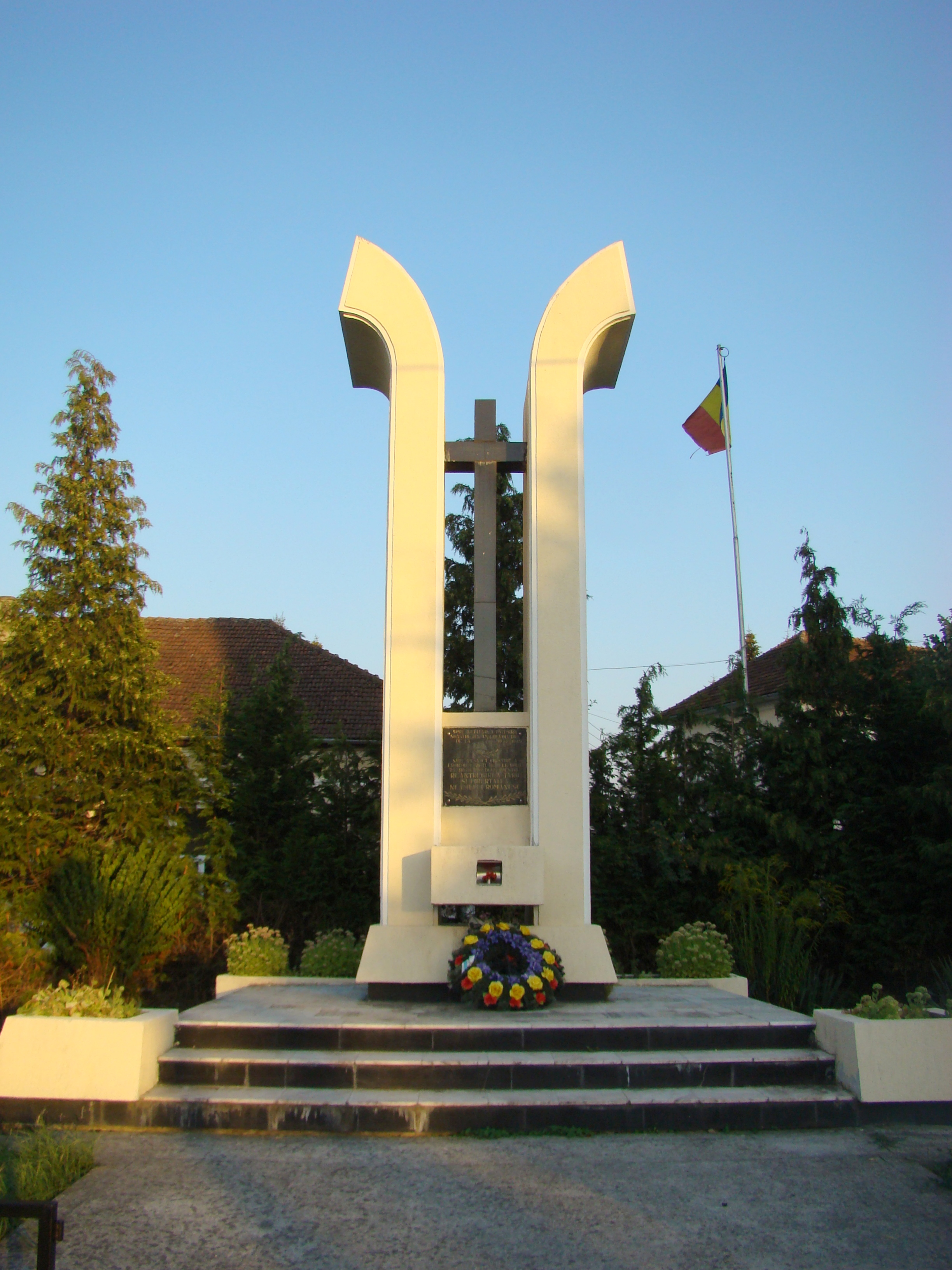 Monument în memoria Eroilor din primul război mondial, sat MIREŞU MARE, județul Maramureș